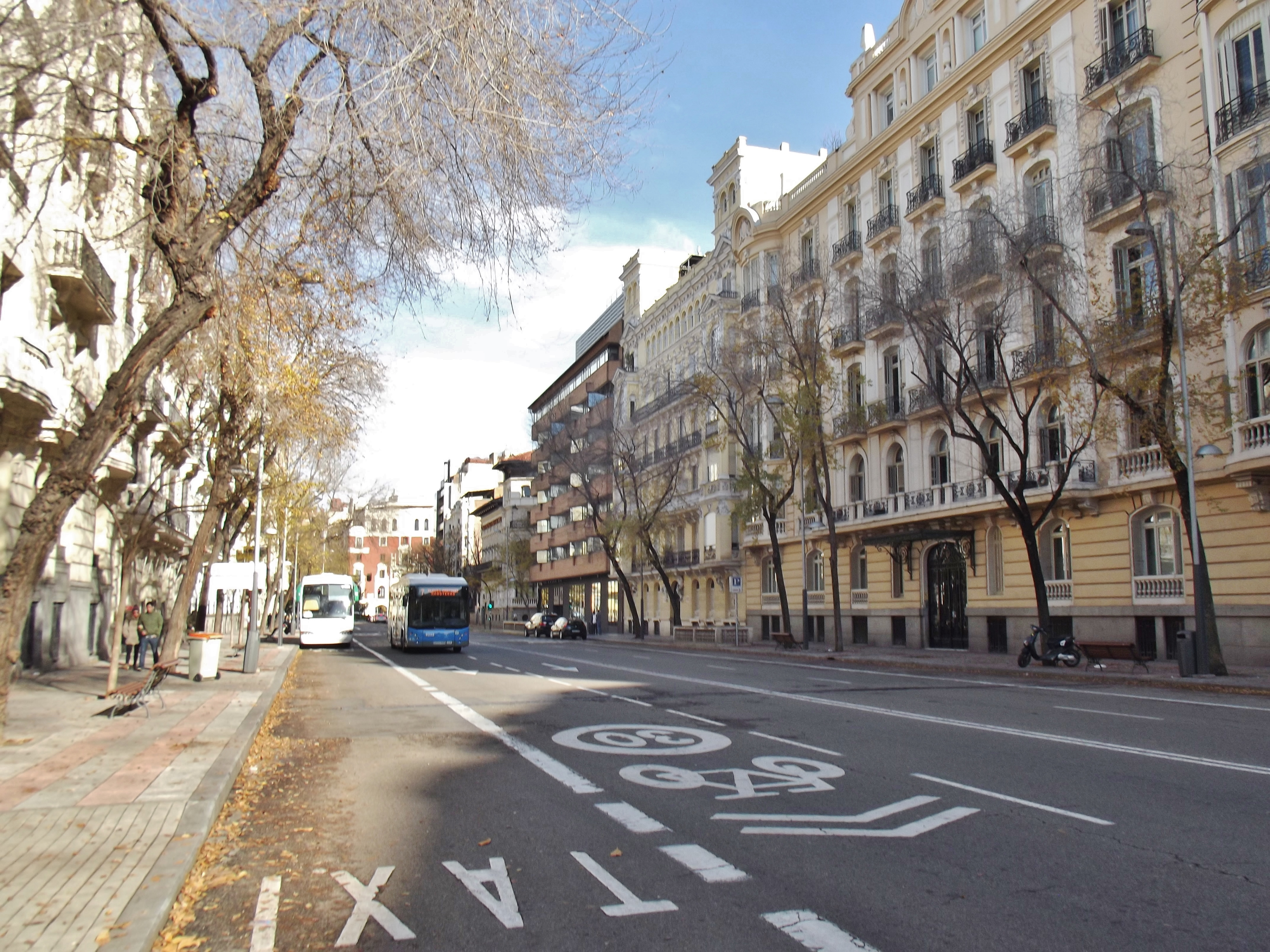 Calle de Almagro, Madrid